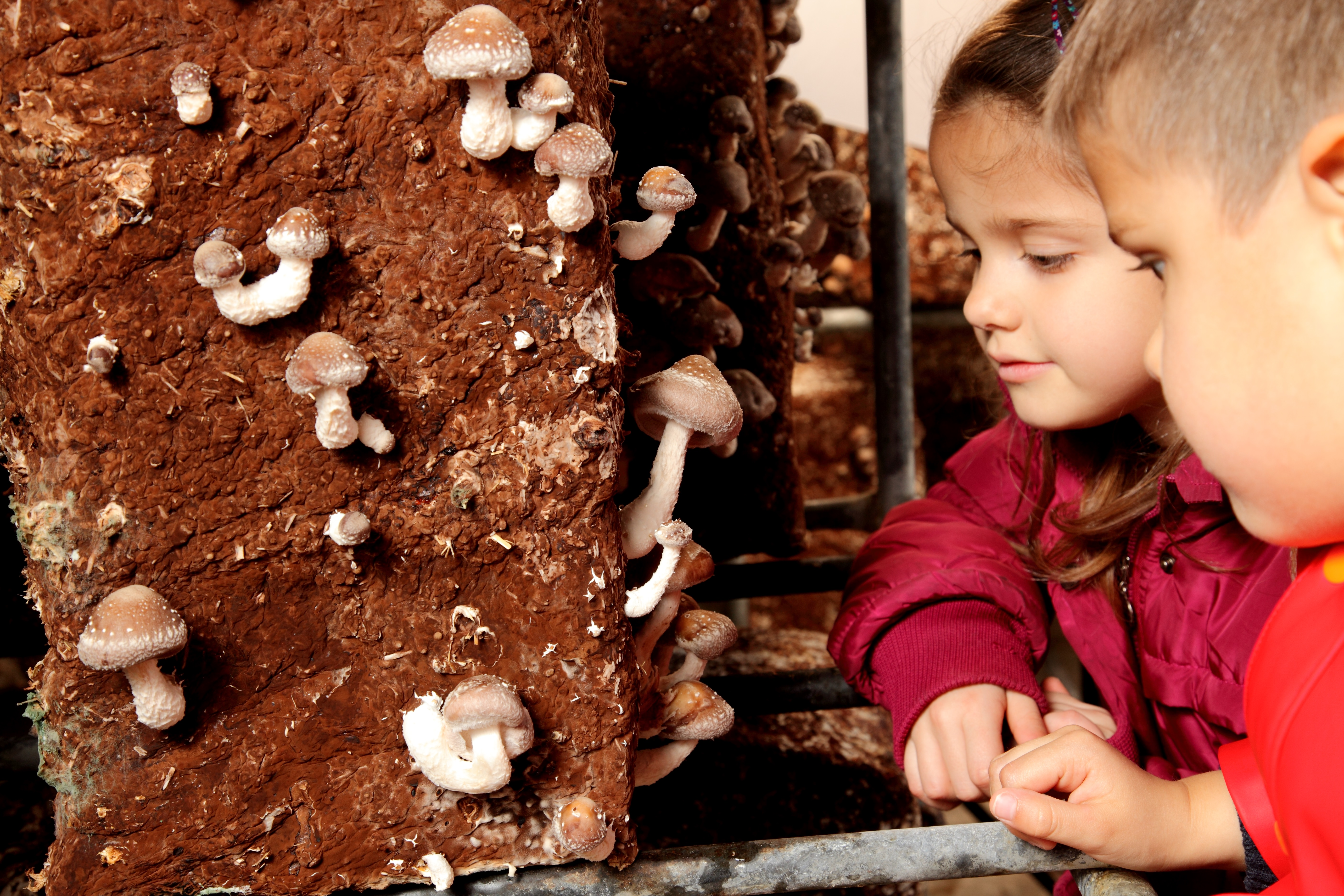 Cultivo de shiitake (lentinula edodes) en Pradejón, localidad líder en producción de hongos en España.